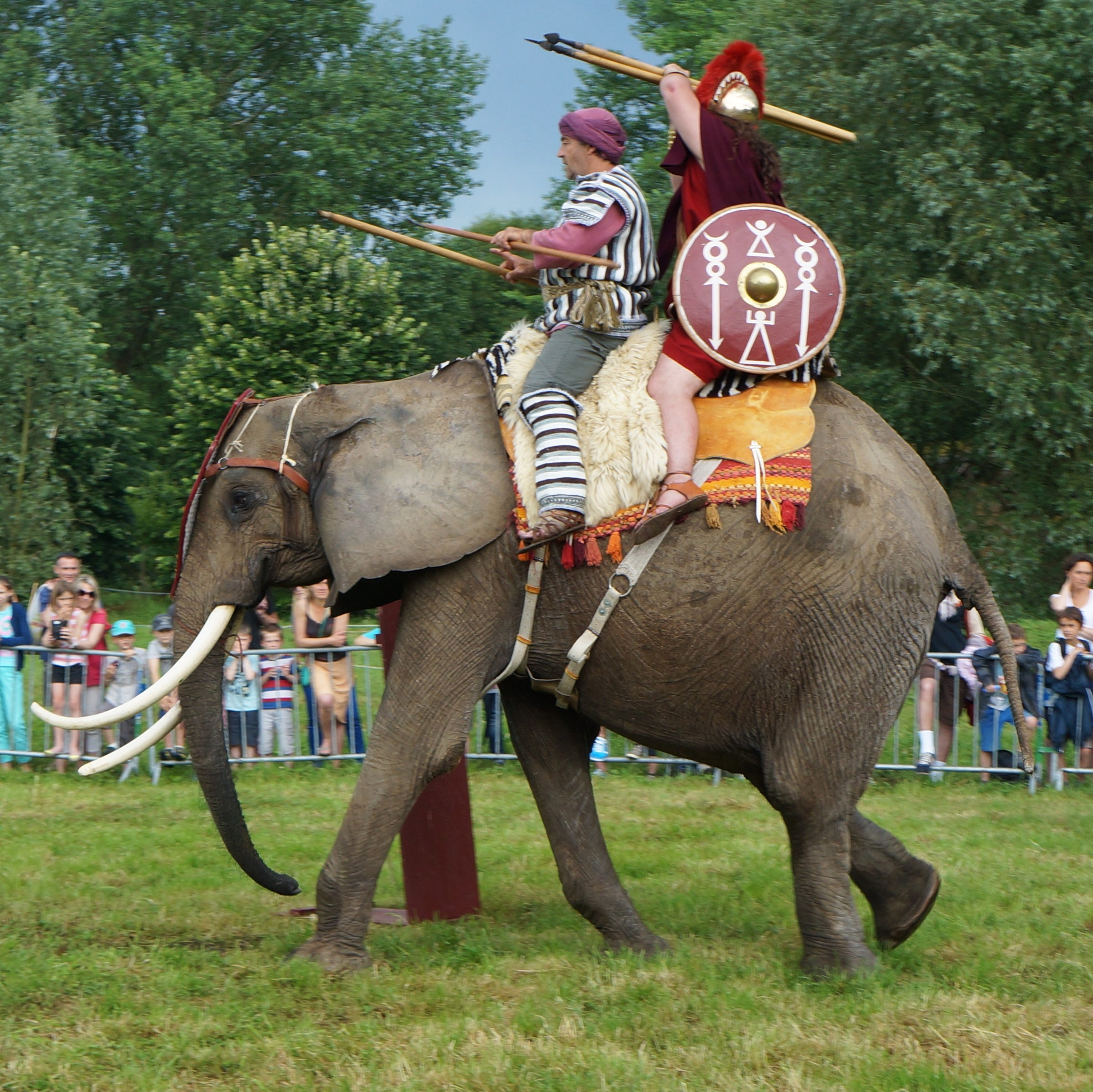 Troupe Carthago, les guerriers d'Hannibal en 2014 dans le Parc archéologique Asnapio, Villeneuve d'Ascq France